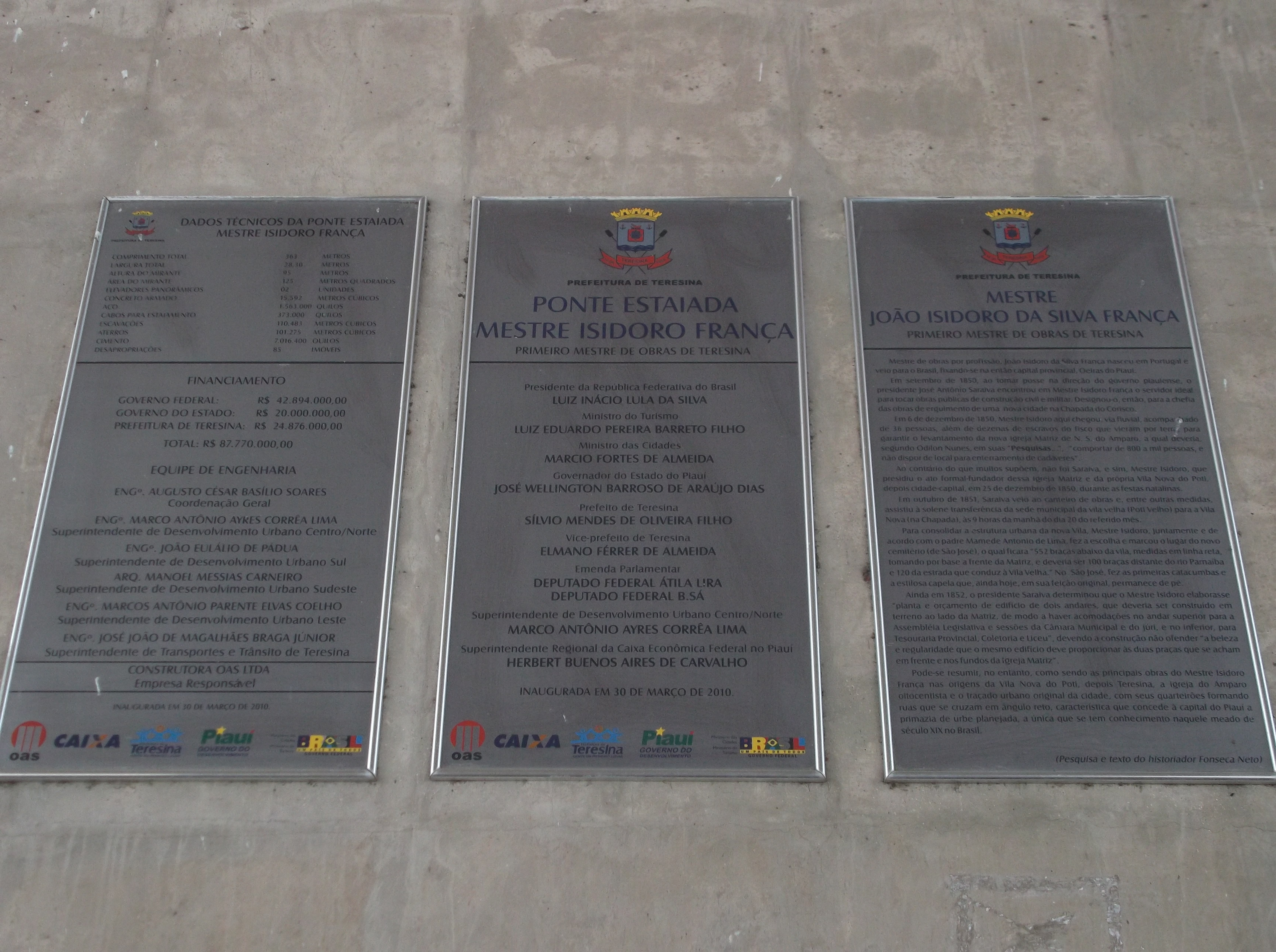 Placas com ons nomes de governaça na Ponte estaida de Teresina,Piauí.